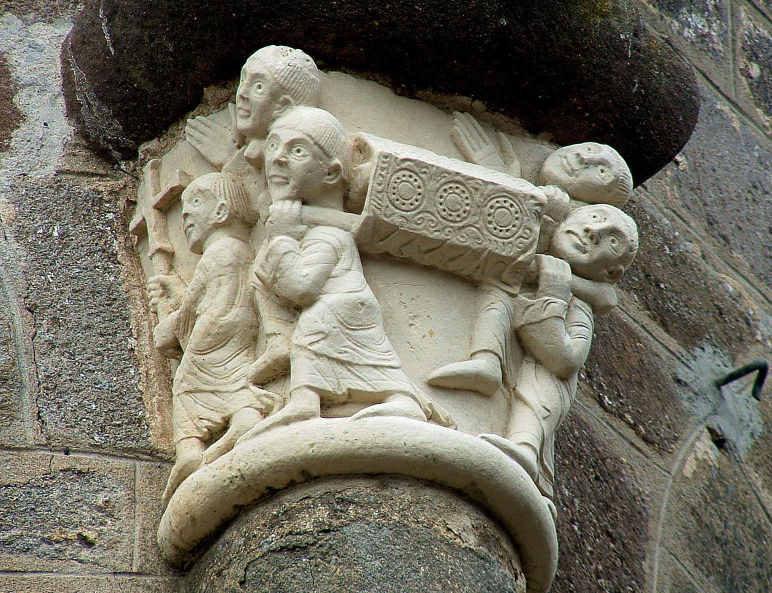 Lubersac - Eglise Saint-Etienne - Chevet - Chapiteau de la translation des reliques de saint Etienne